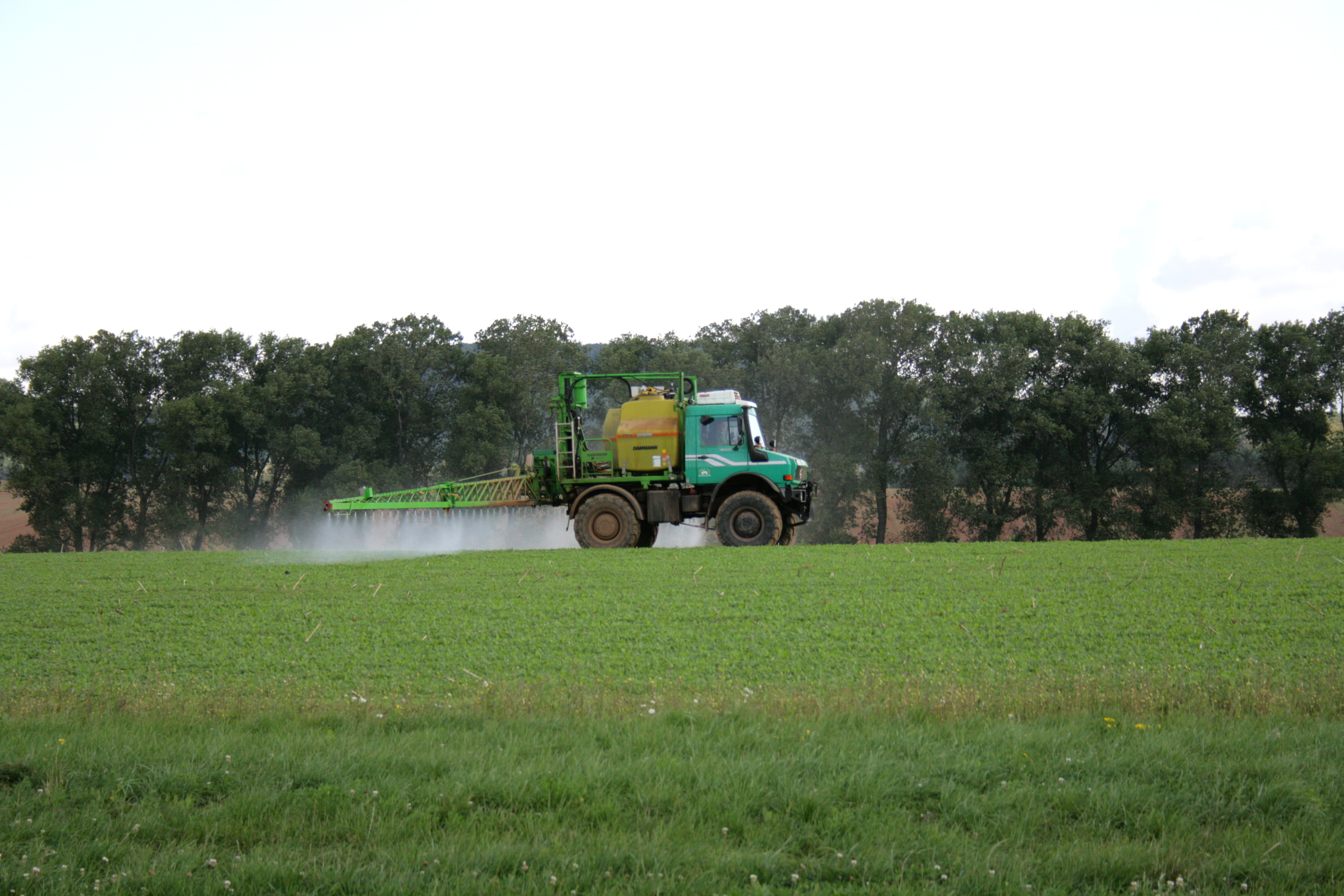 An der Straße „Auf dem Pfingstrasen“ in Breitenworbis